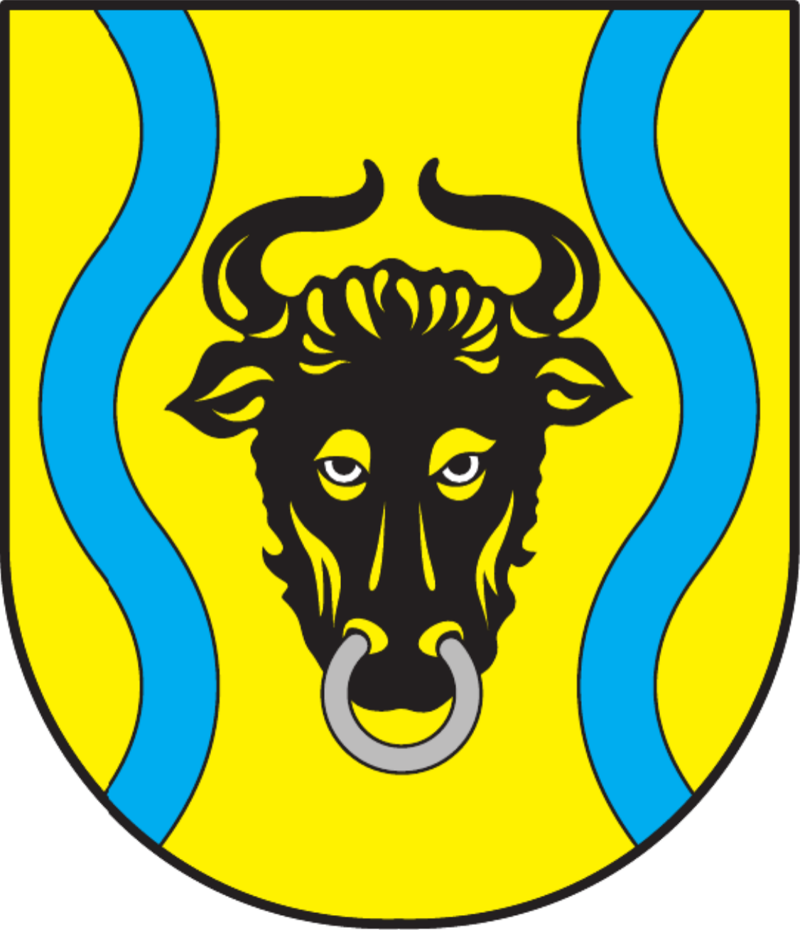 Herb gminy Popów